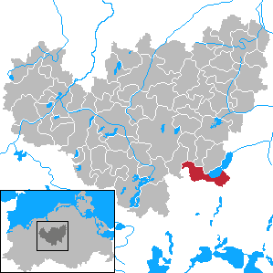 Dahmen in Mecklenburg-Vorpommern - District Güstrow